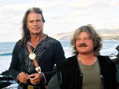 Waterloo & Robinson in der Türkei, Sommer 2003